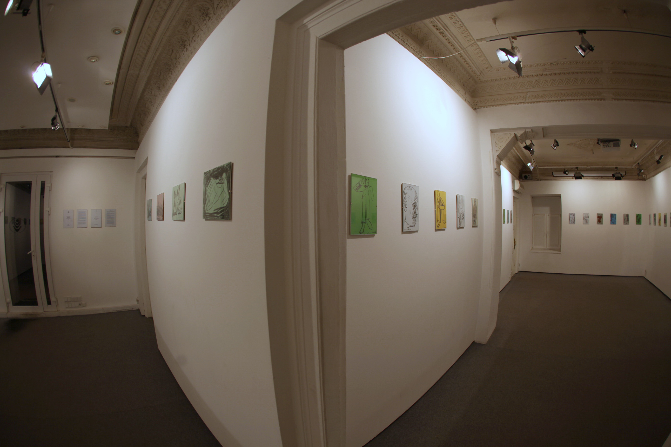 Олексій Аполлонов "Блокнот художника", 2013